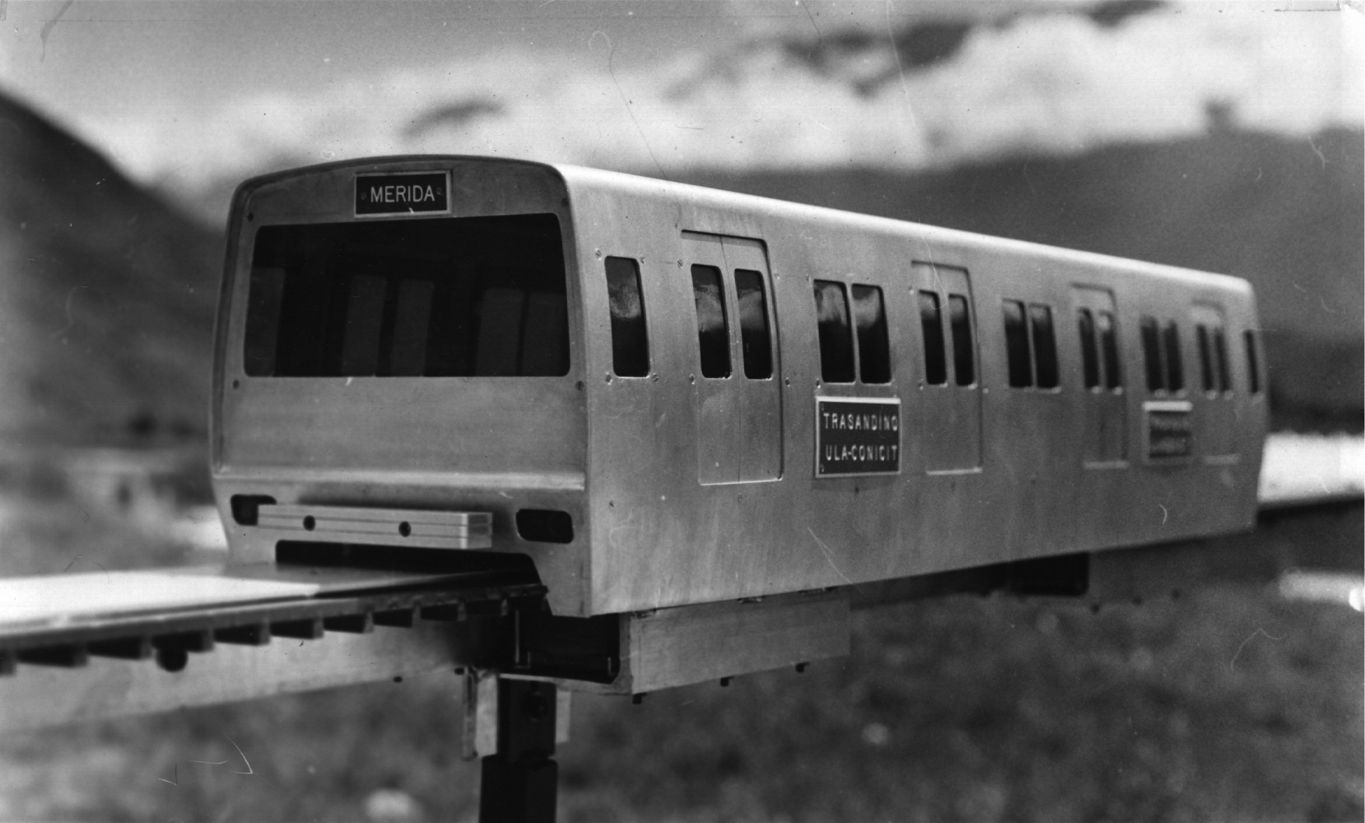 Prototipo 3 del TELMAGV